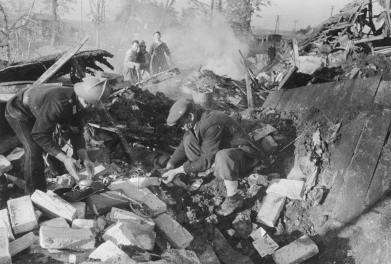 Zentralbild 120-46 II. Weltkrieg 1939 - 1945 Britische Luftangriffe auf Hamburg Bergungstruppen durchsuchen nach einem Luftangriff die Trümmer nach Opfern.